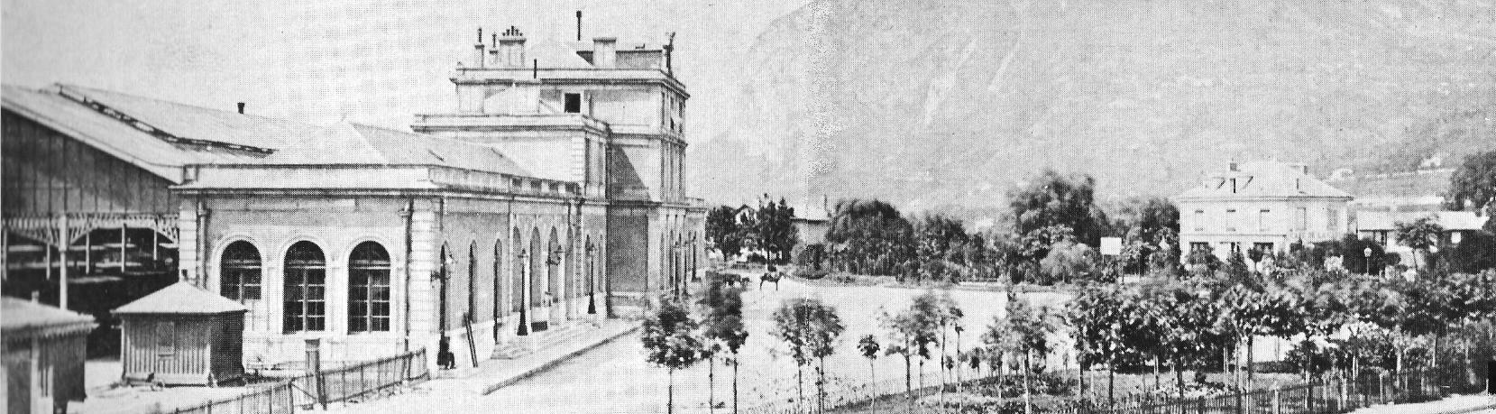 Place de la gare de Grenoble vers 1870.